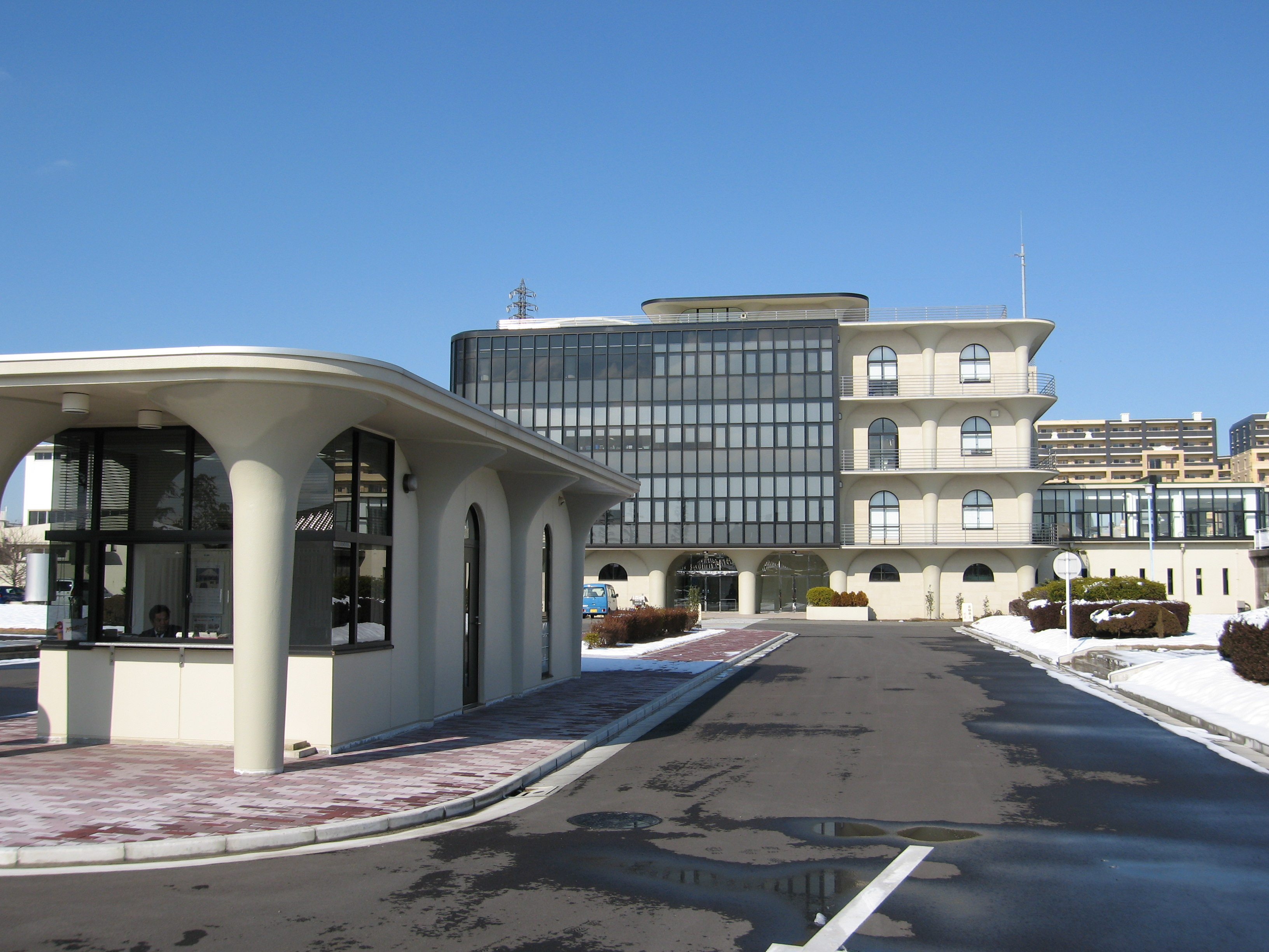 "Nagasawa Purification Plant" (Ｙamada Ｍamoru 1957) at Kawasaki, Japan